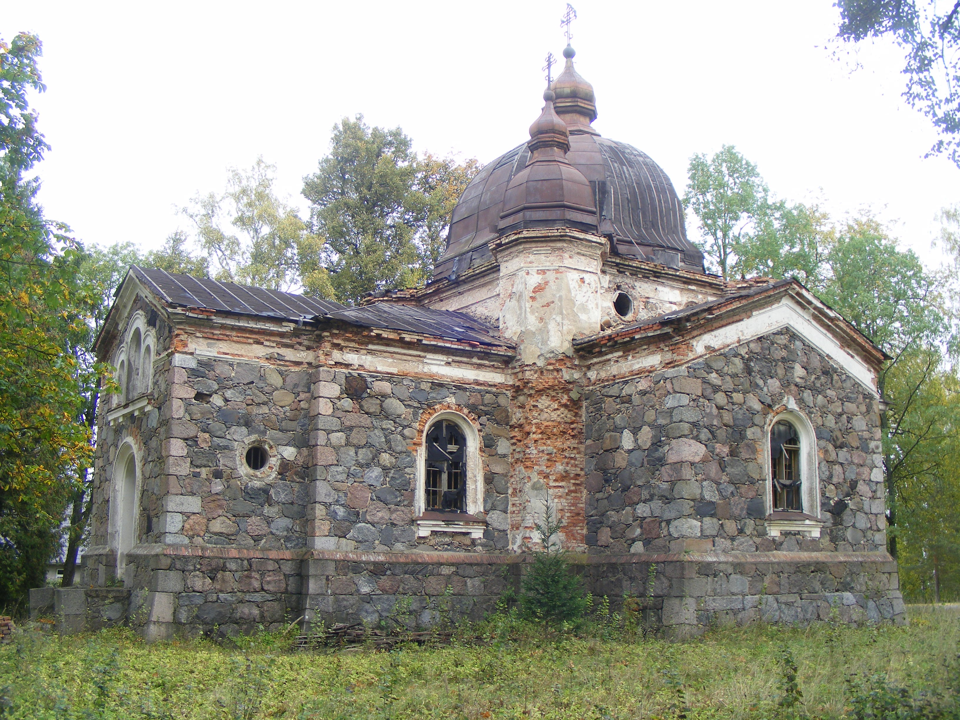 Väga kurvas seisus kirikuhoone Tartumaal.